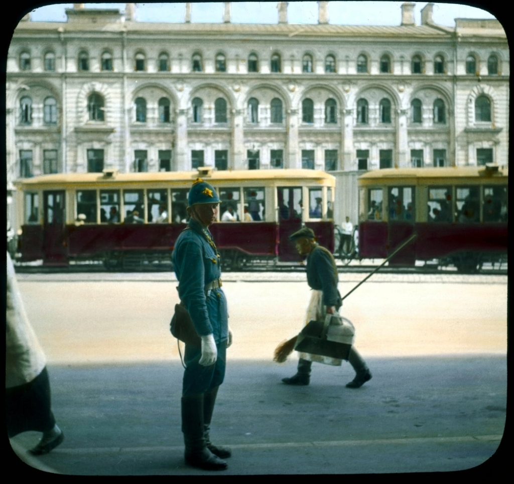 Москва. Моисеевская площадь. Вид на будущую Манежную площадь